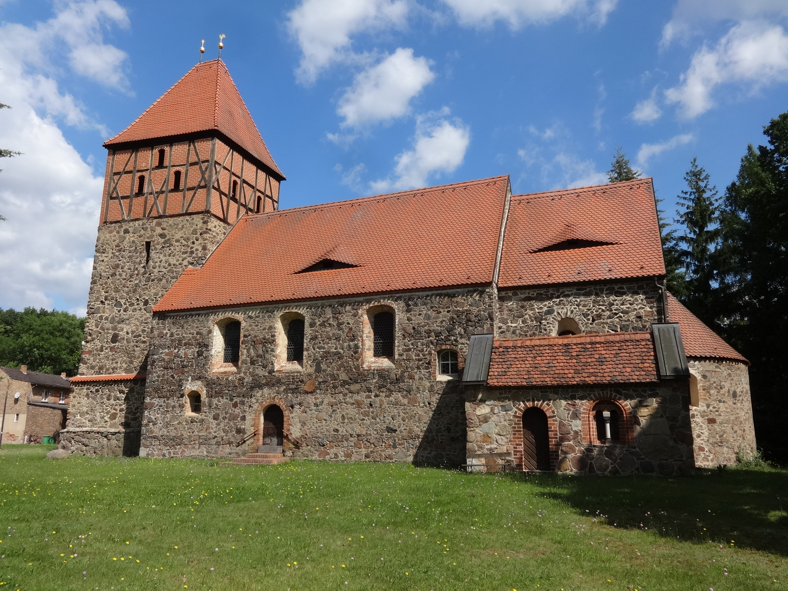 Die Dorfkirche Wildau-Wentdorf ist eine gotische Feldsteinkirche aus dem 13. Jahrhundert, die zu einem späteren Zeitpunkt barock überformt wurde. Im Innern befinden sich eien Kanzel aus dem 17. Jahrhundert, ein Taufbecken aus dem Jahr 1588 sowie eine Dinse-Orgel.